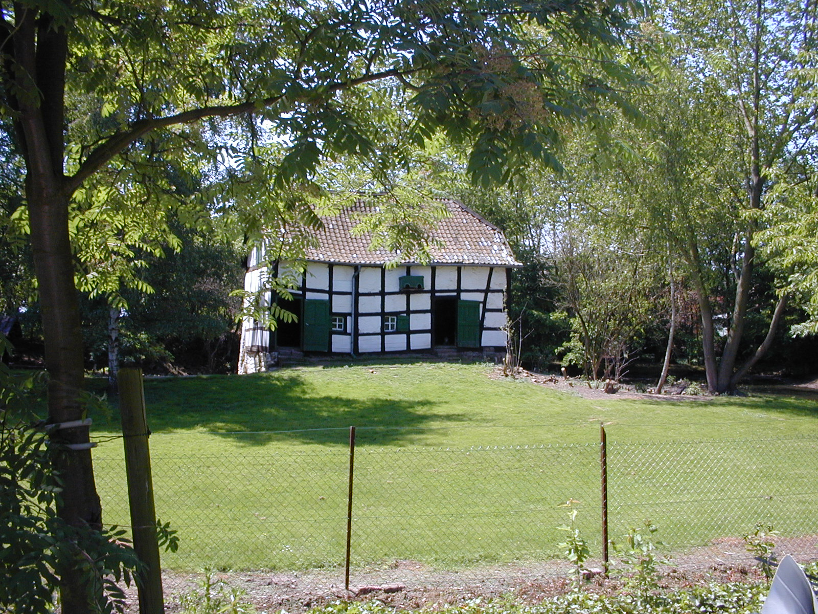 Das alte Backhaus in Irresheim bei Nörvenich